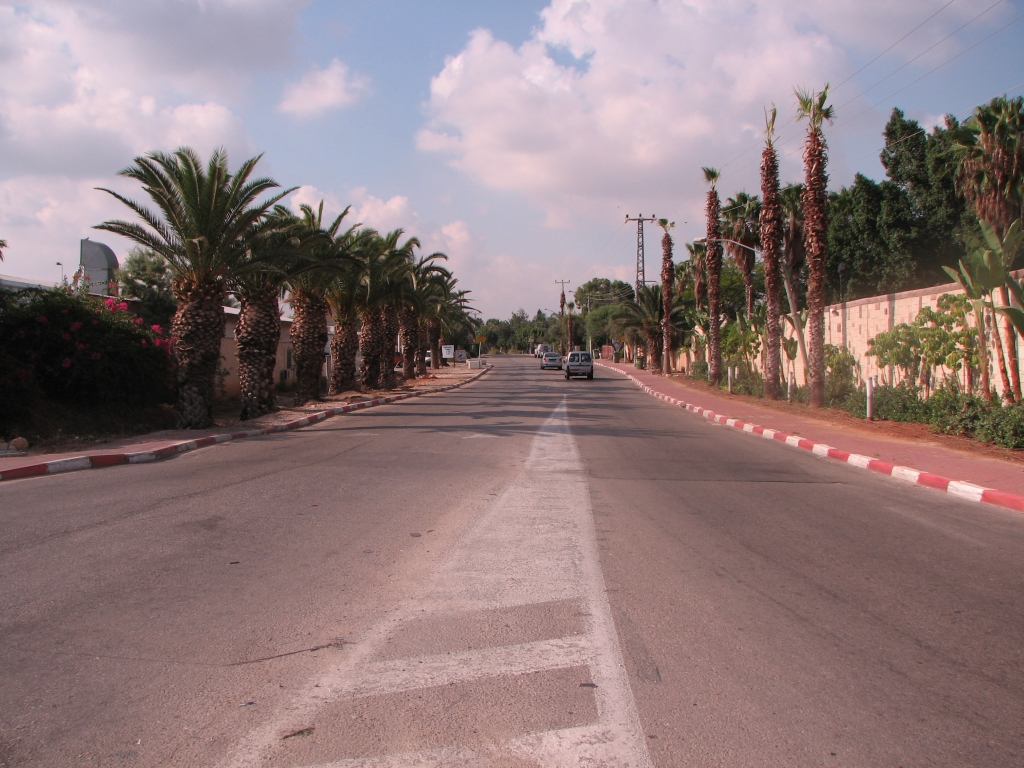 הכניסה למושב כפר טרומן